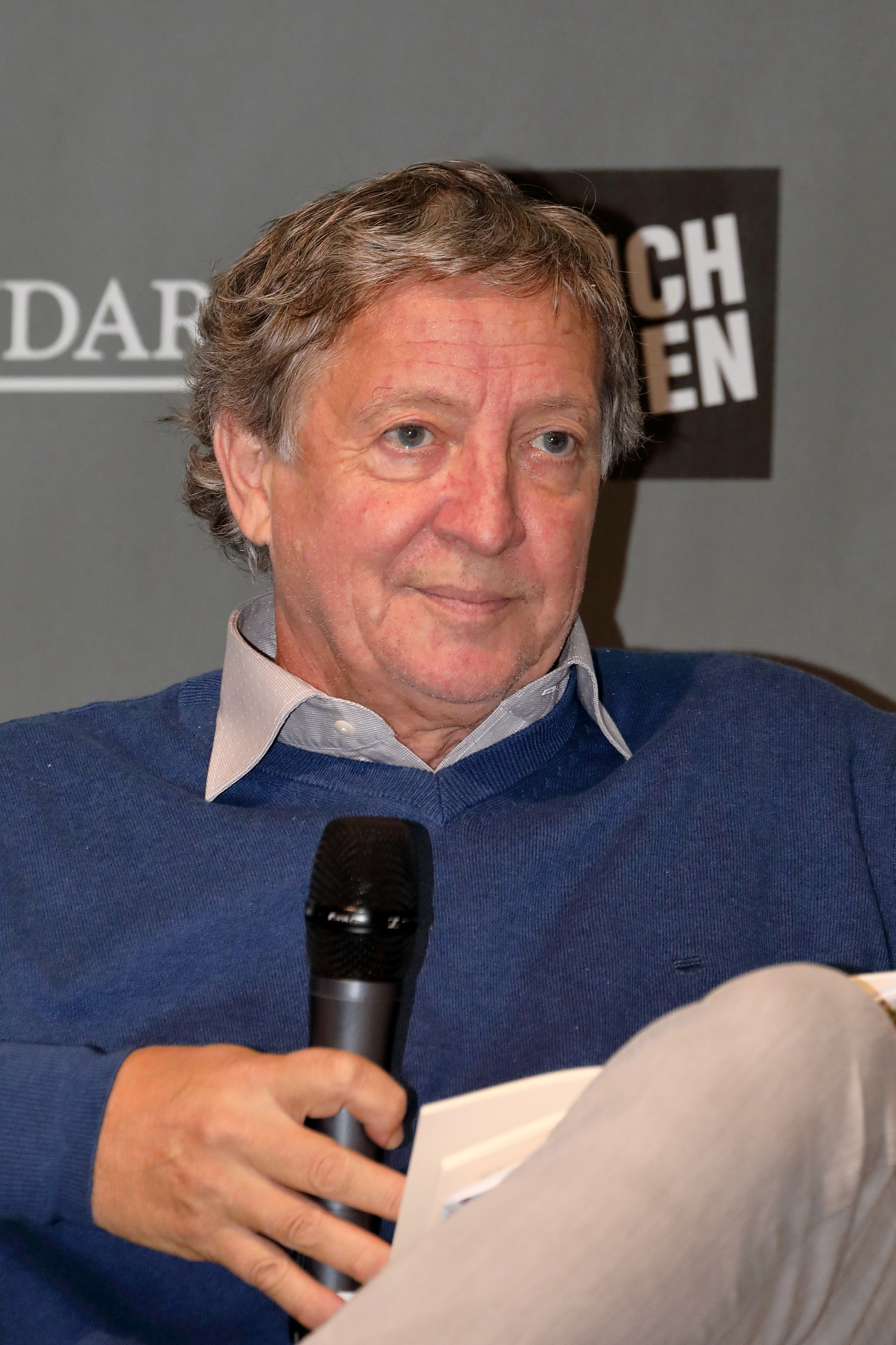 Der österreichische Schriftsteller, Essayist und Dramatiker Antonio Fian bei der Präsentation eines seiner Bücher auf der Standard-Bühne der Wiener Buchmesse 2018.